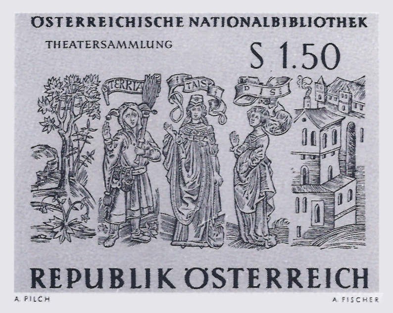 Sondermarke zur Österreichischen Nationalbibliothek mit Holzschnitt-Motiven von Hans Grüninger für die 1496 herausgegebenen Komödien von Terenz